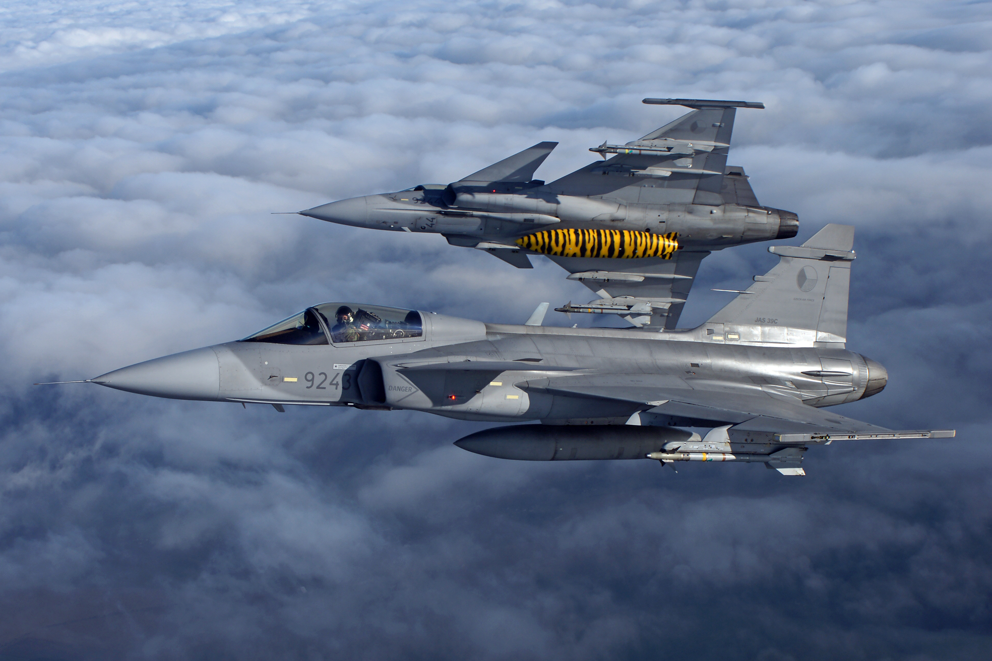 Saab JAS-39 Gripen (Czech Air Force)